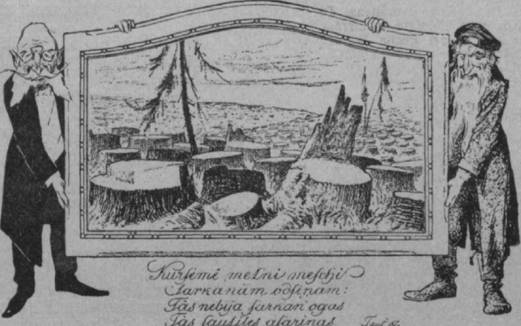 "Altes Lied, neues Landschaftsbild": Deutsch-baltischer Baron und Jüdischer Holzhändler präsentieren die neue abgeholzte Landschaft Kurlands. Lettische Karikatur aus der Zeitschrift "Svari" 1907